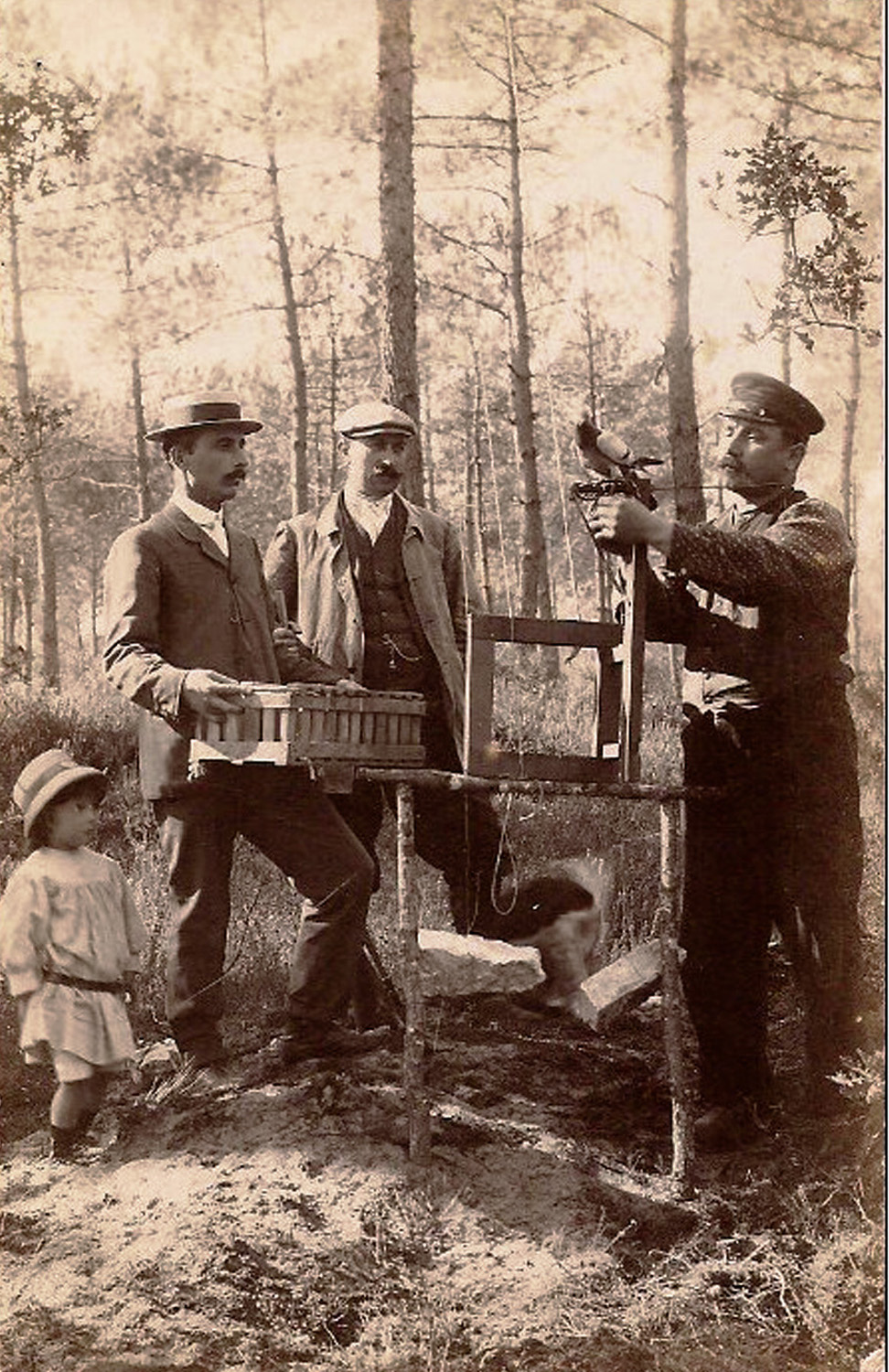 Pose d'un appeau 1910